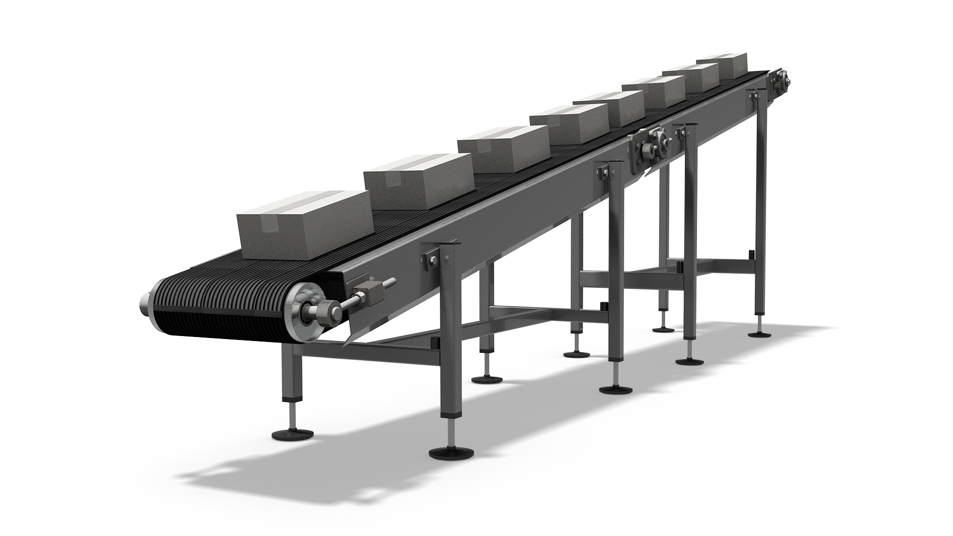 Opvoerband met producten. Hier een voorbeeld van een Continu transporteur.